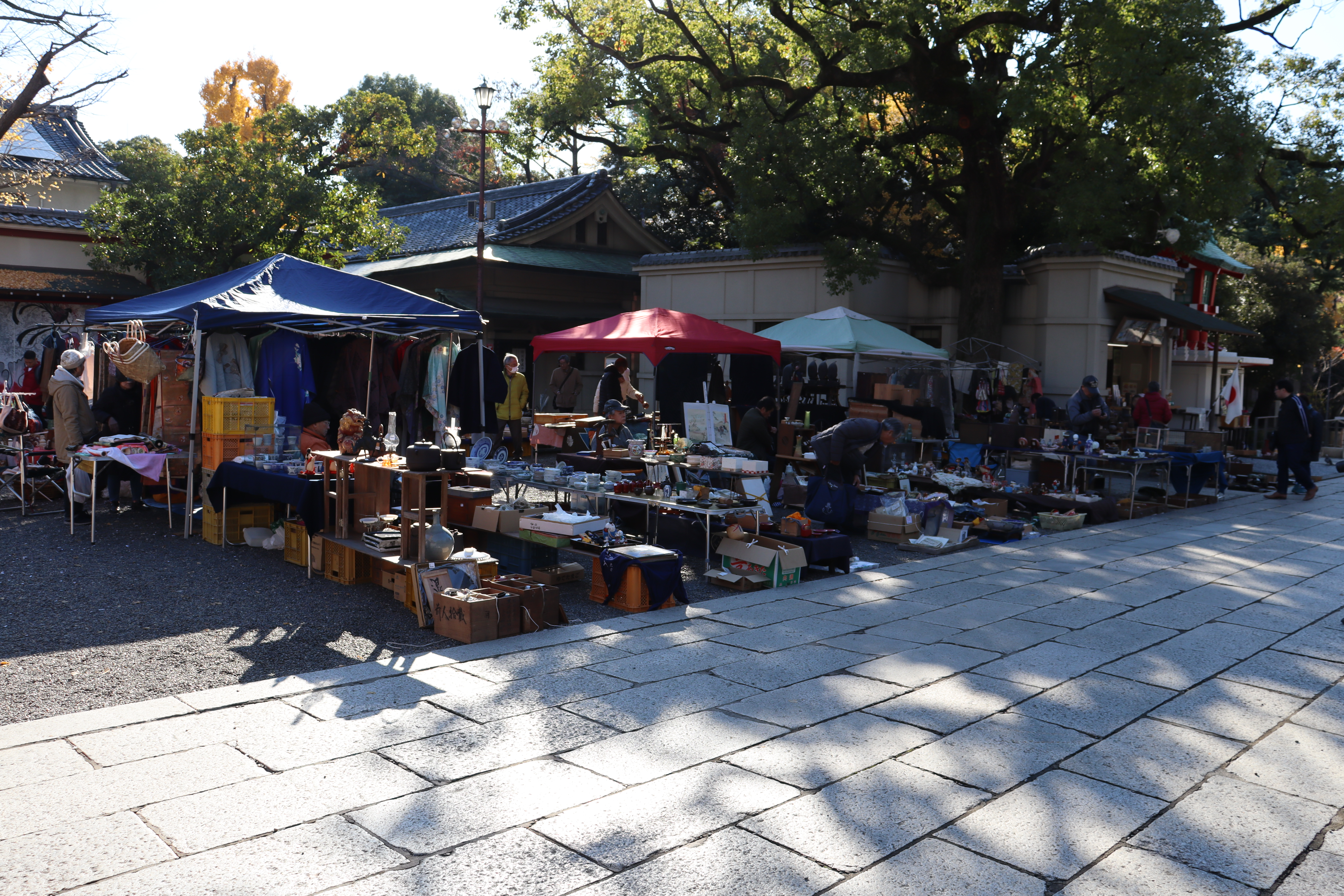 富岡八幡宮の骨董市